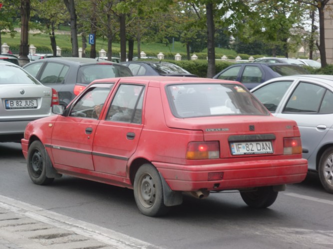 Dacia Nova photographiée à Bucarest, devant le Palais du Peuple.